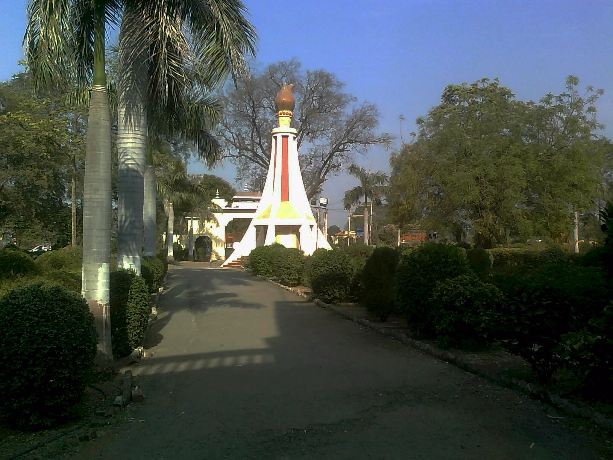 Dhanaji Nana Mahavidyalaya (D N College) at Faizpur (tal- Yawal, dist-Jalgaon, Maharashtra, India)